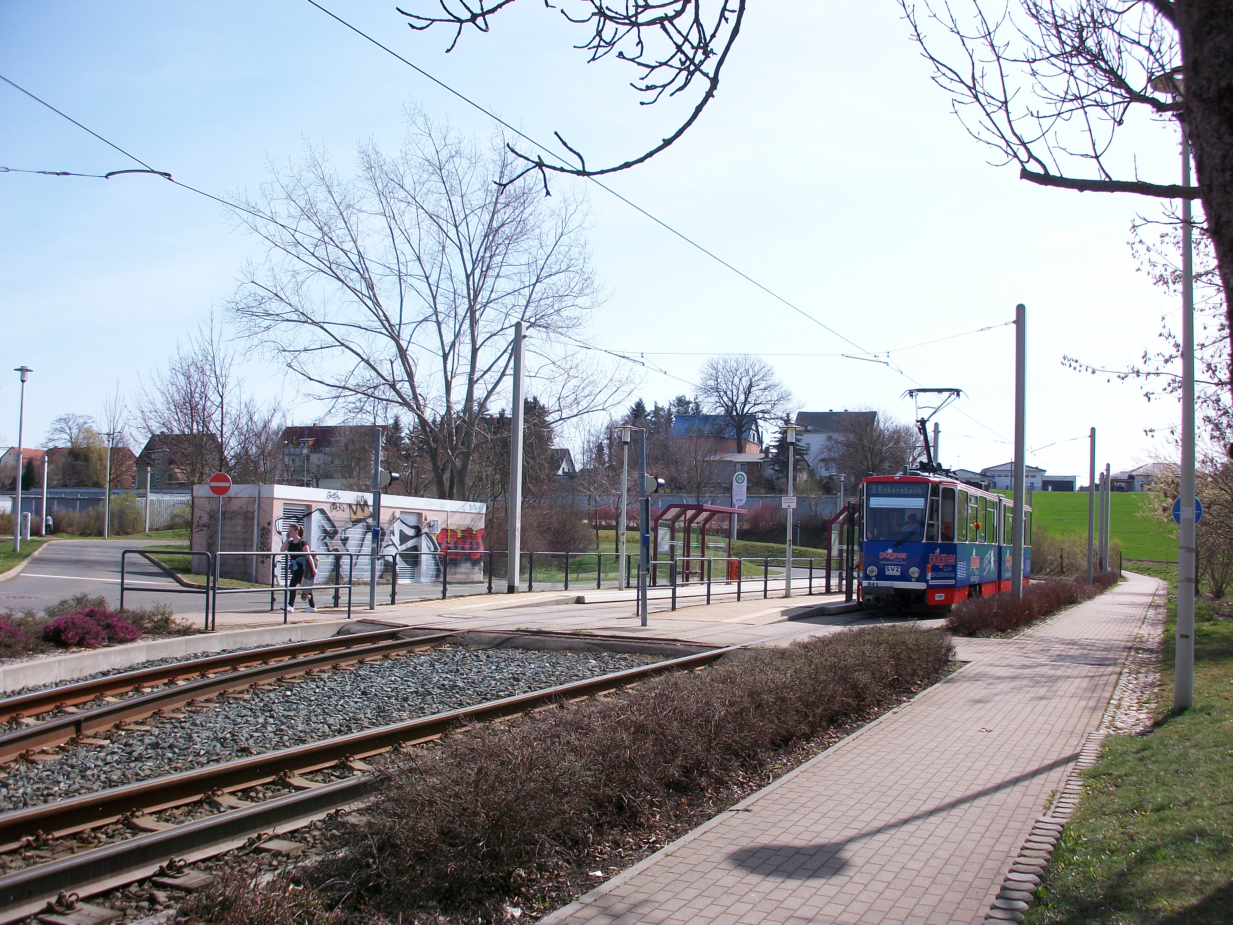 Endhaltestelle der Straßenbahn in Neuplanitz (2016)